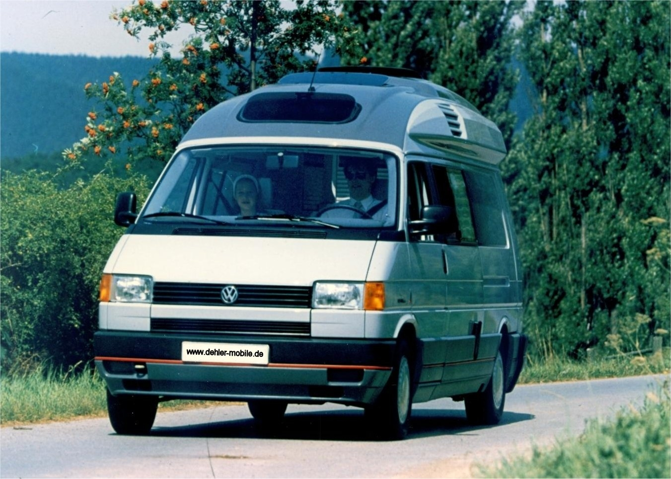 VW Dehler Typ2 T4 Optima 5.4 Baujahr 1994